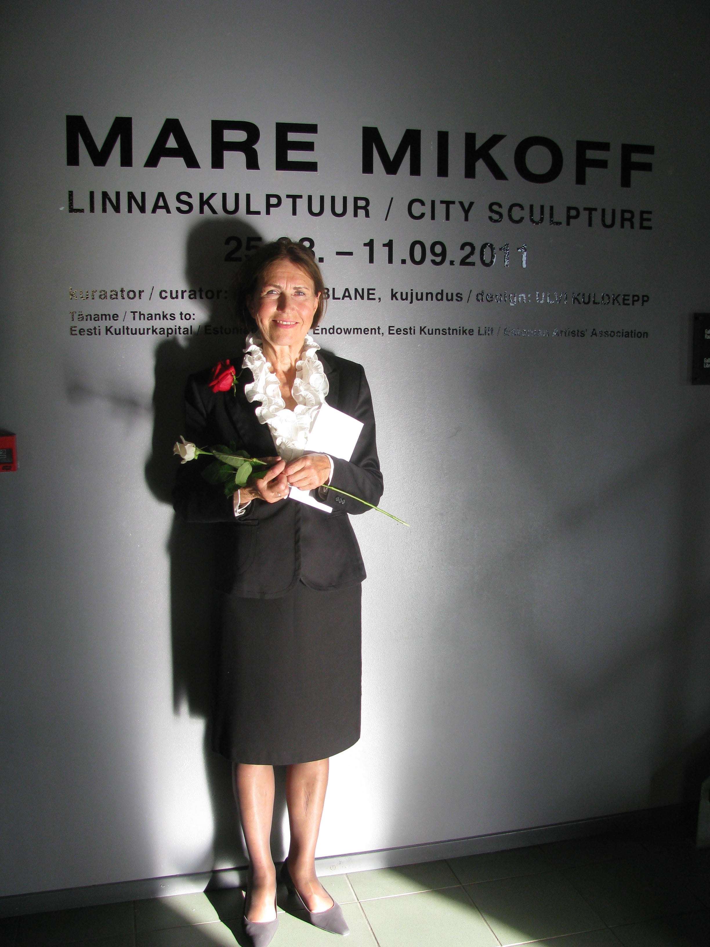 Mare Mikoff oma näituse "Linnaskulptuurid" avamisel Arhitektuurimuuseumis